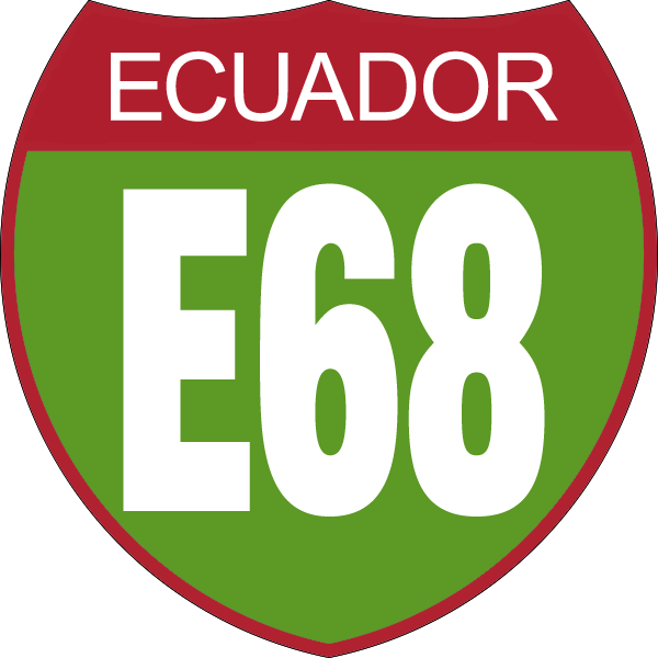 Disco de Identificación Ruta E68